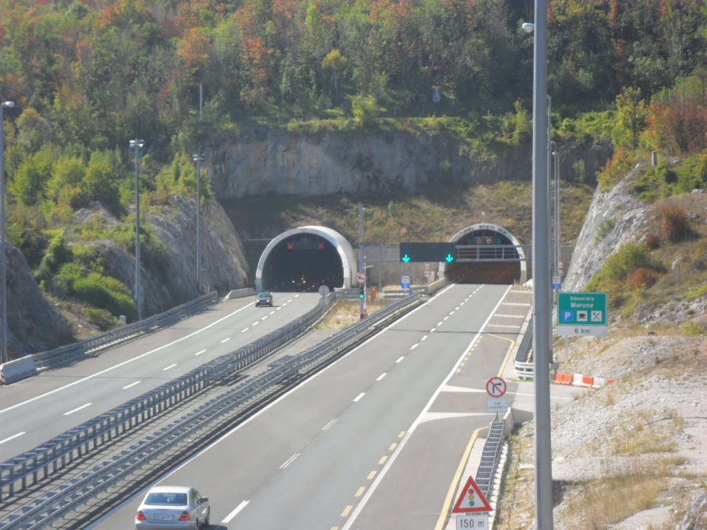 Tunel Sv. Rok